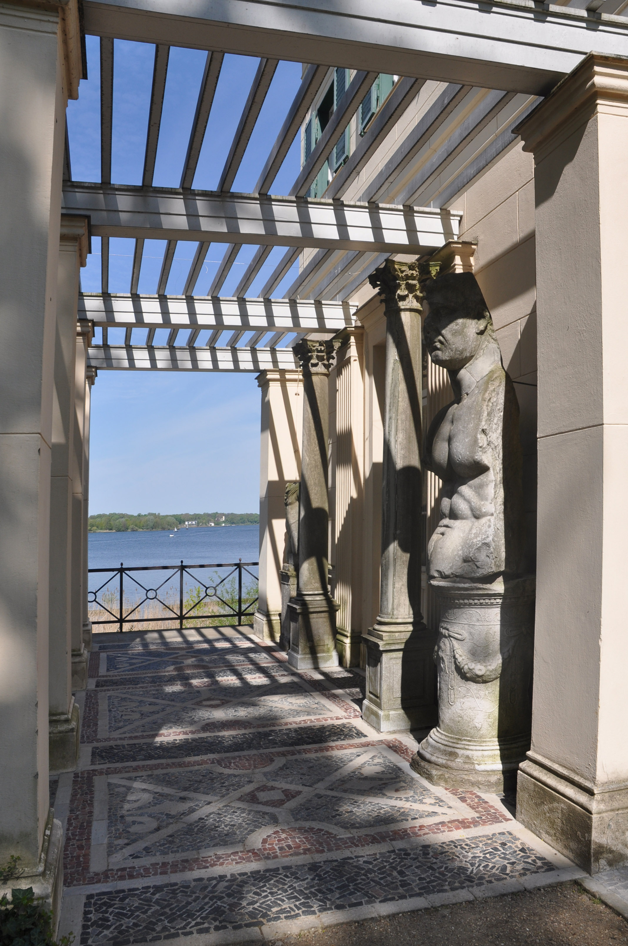 Park Klein-Glienicke, Südpergola des Casinos